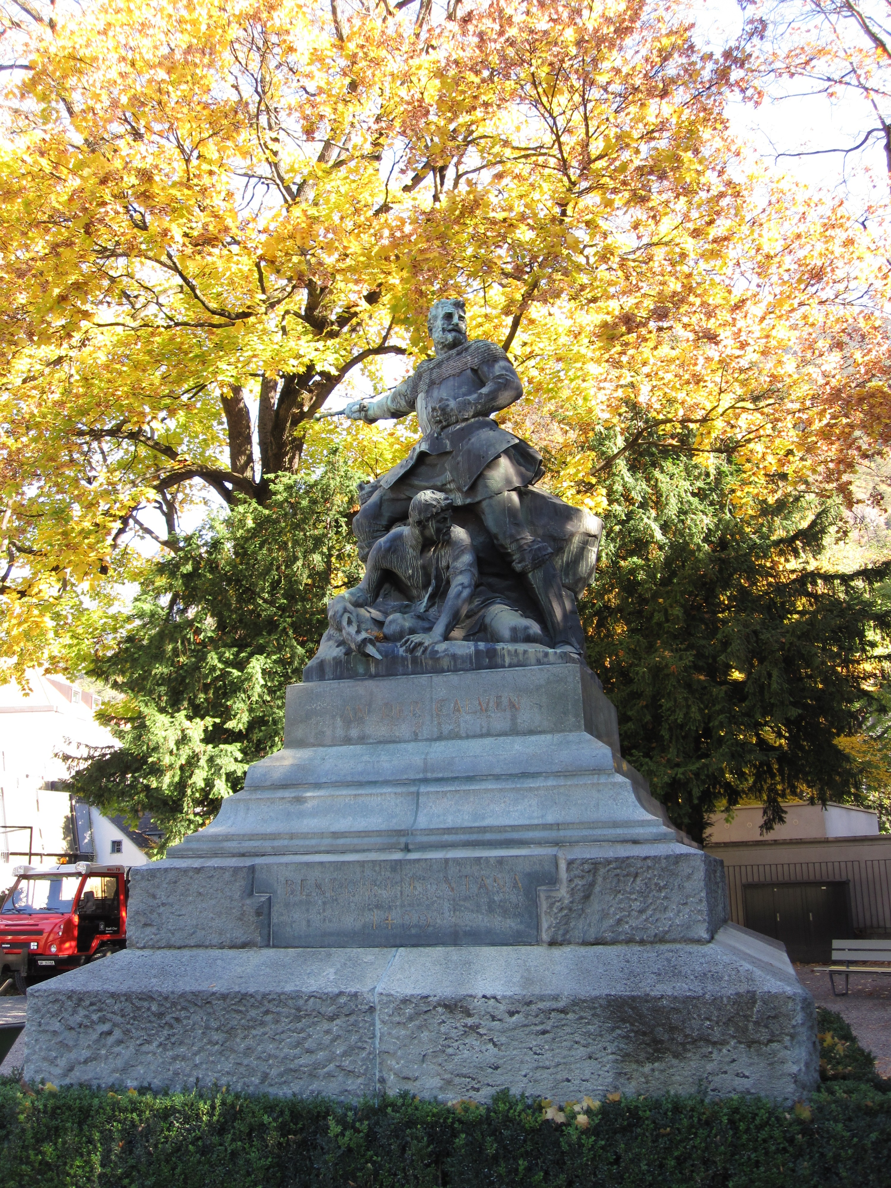 Benedikt-Fontana-Denkmal in Chur (Kanton Graubünden)